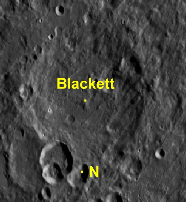 Cráter lunar Blackett. Cráteres satélite. (Imagen LRO)